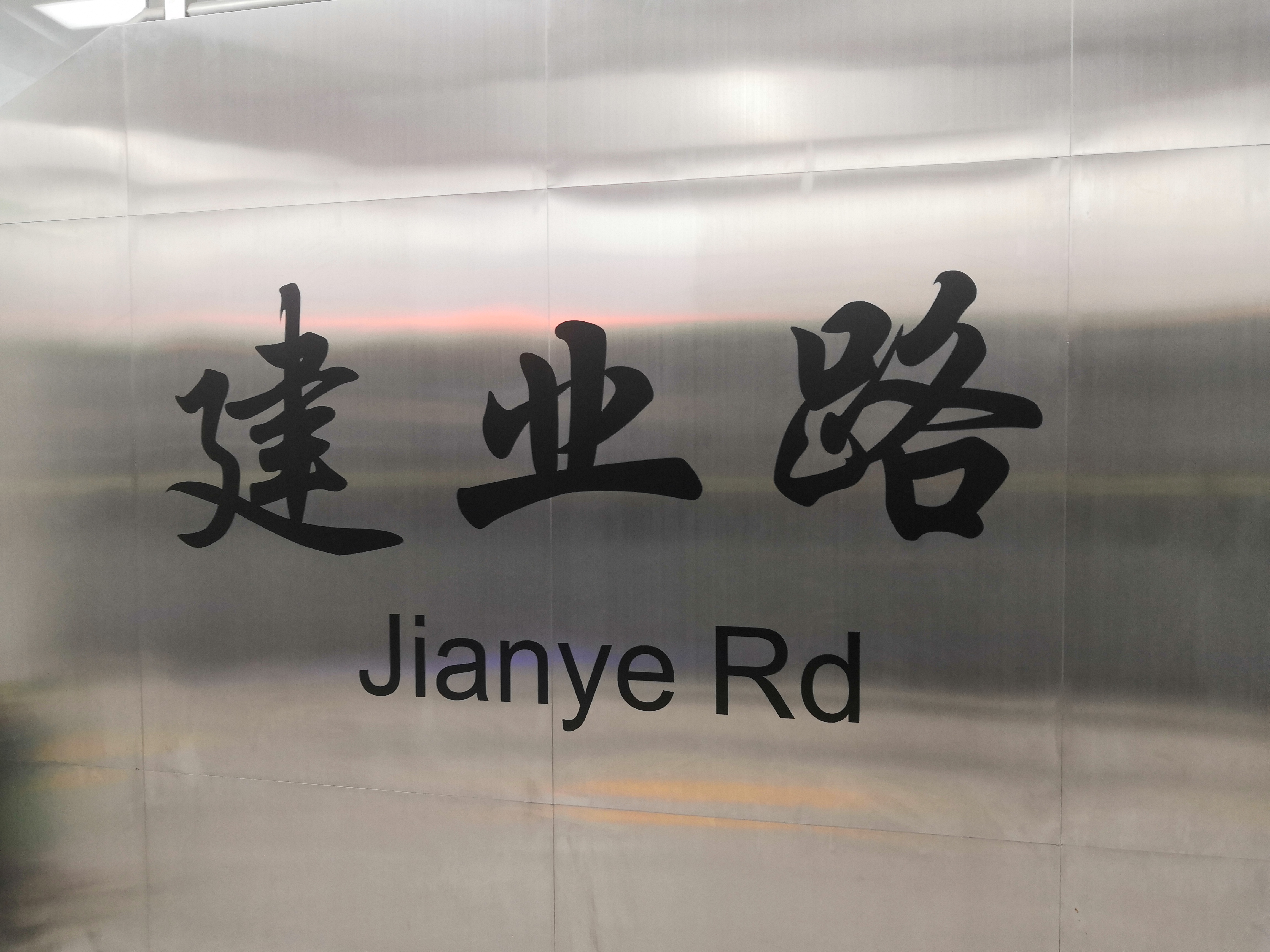 建业路站标志